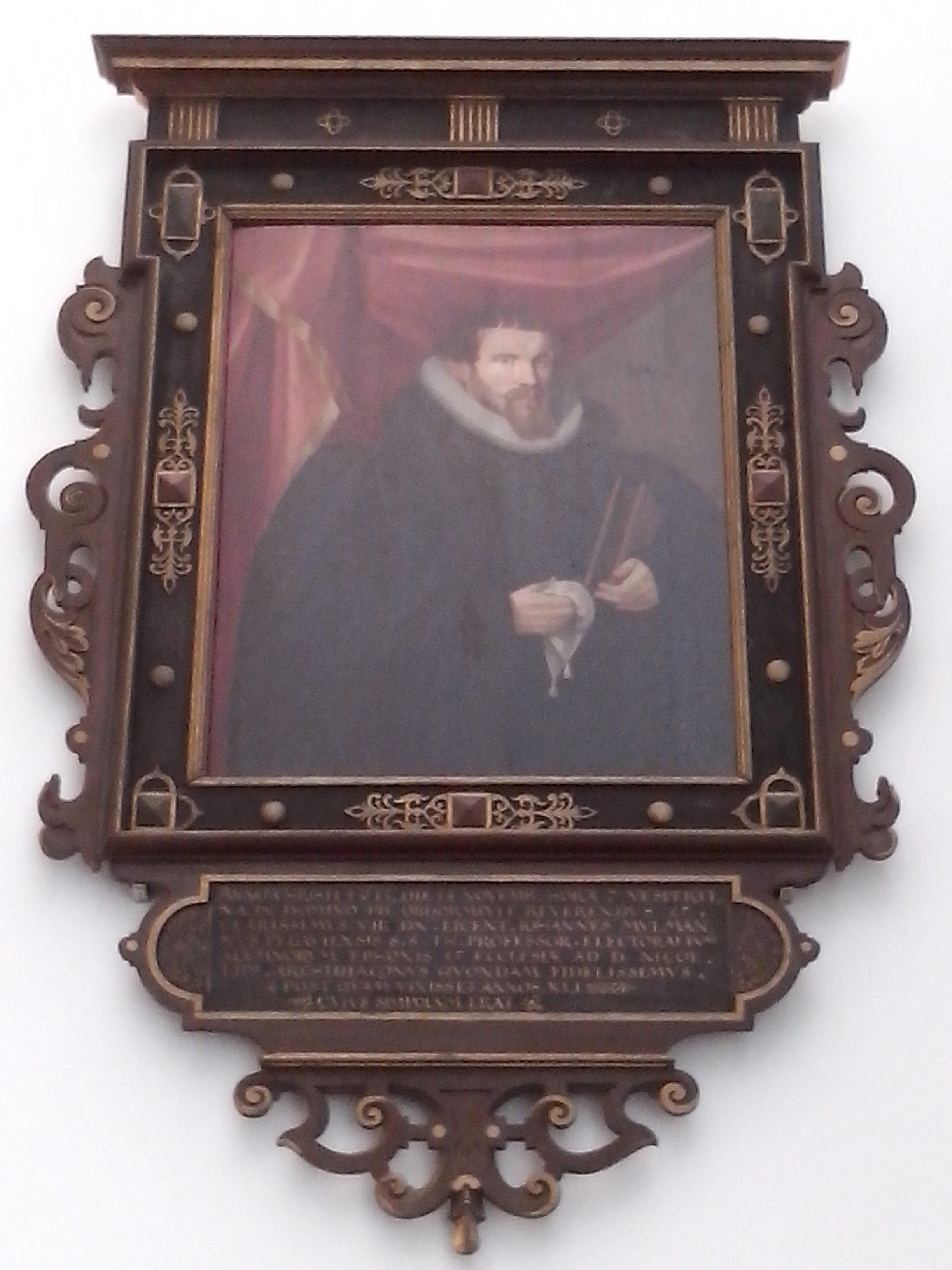 Johann Mühlmann (1573-1613) Epitaph in der Paulinum, Leipzig